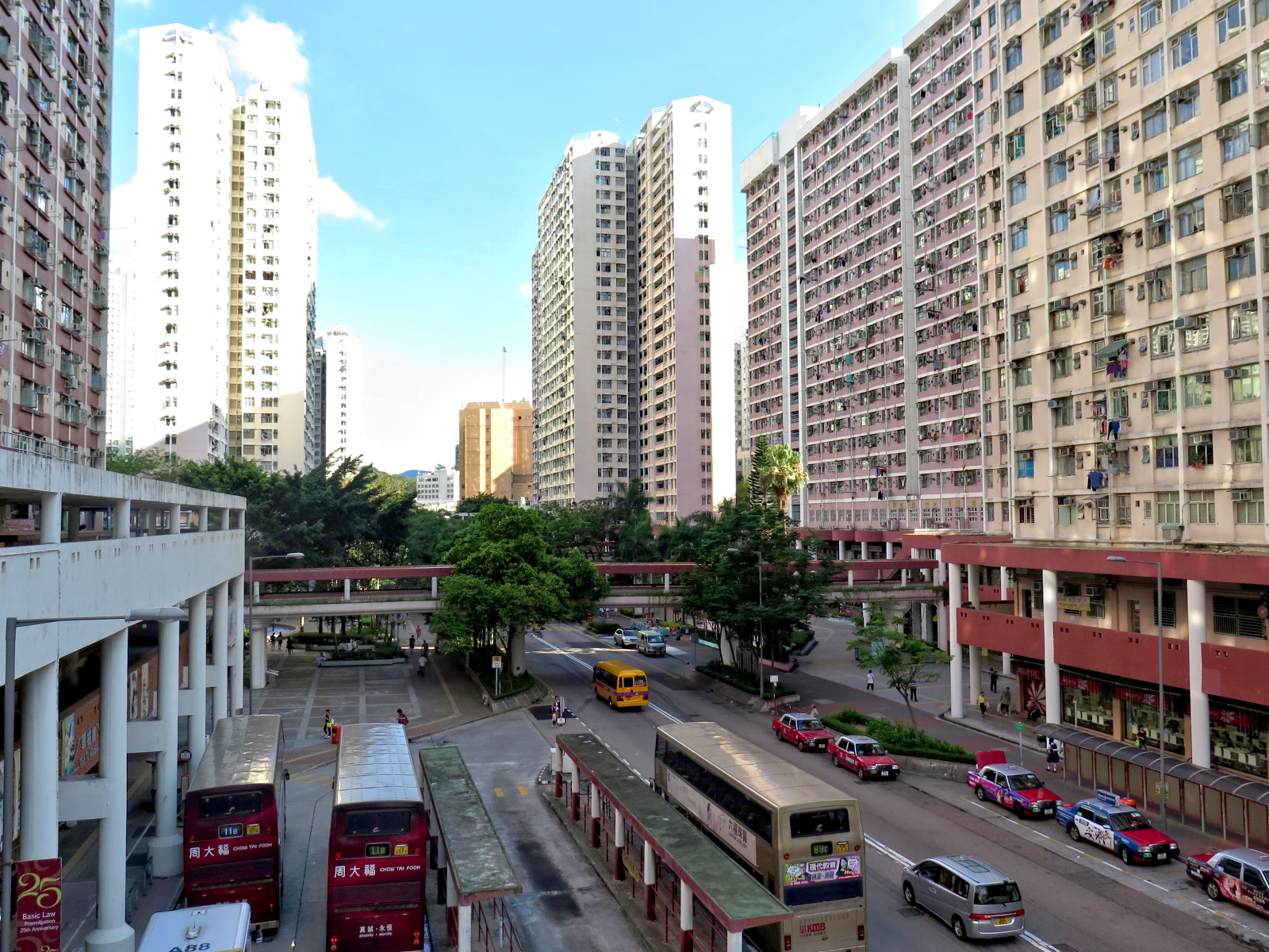 Tsui Ping North Estate